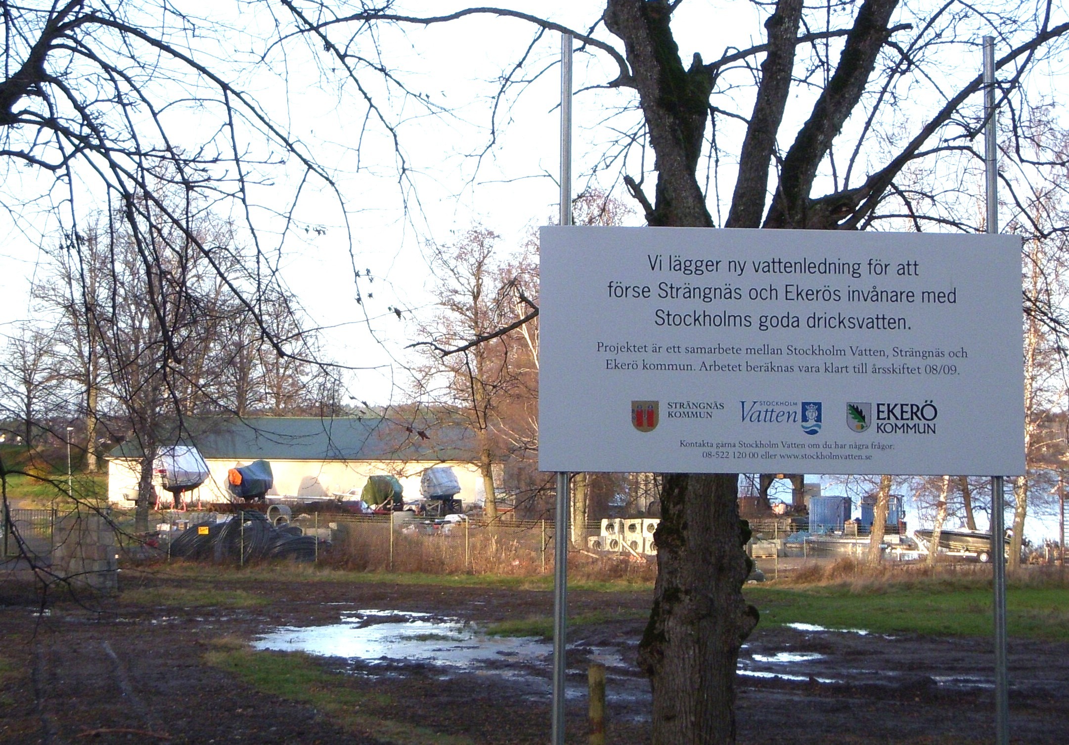 Norsborgs vattenverk, byggnader vid Mälaren